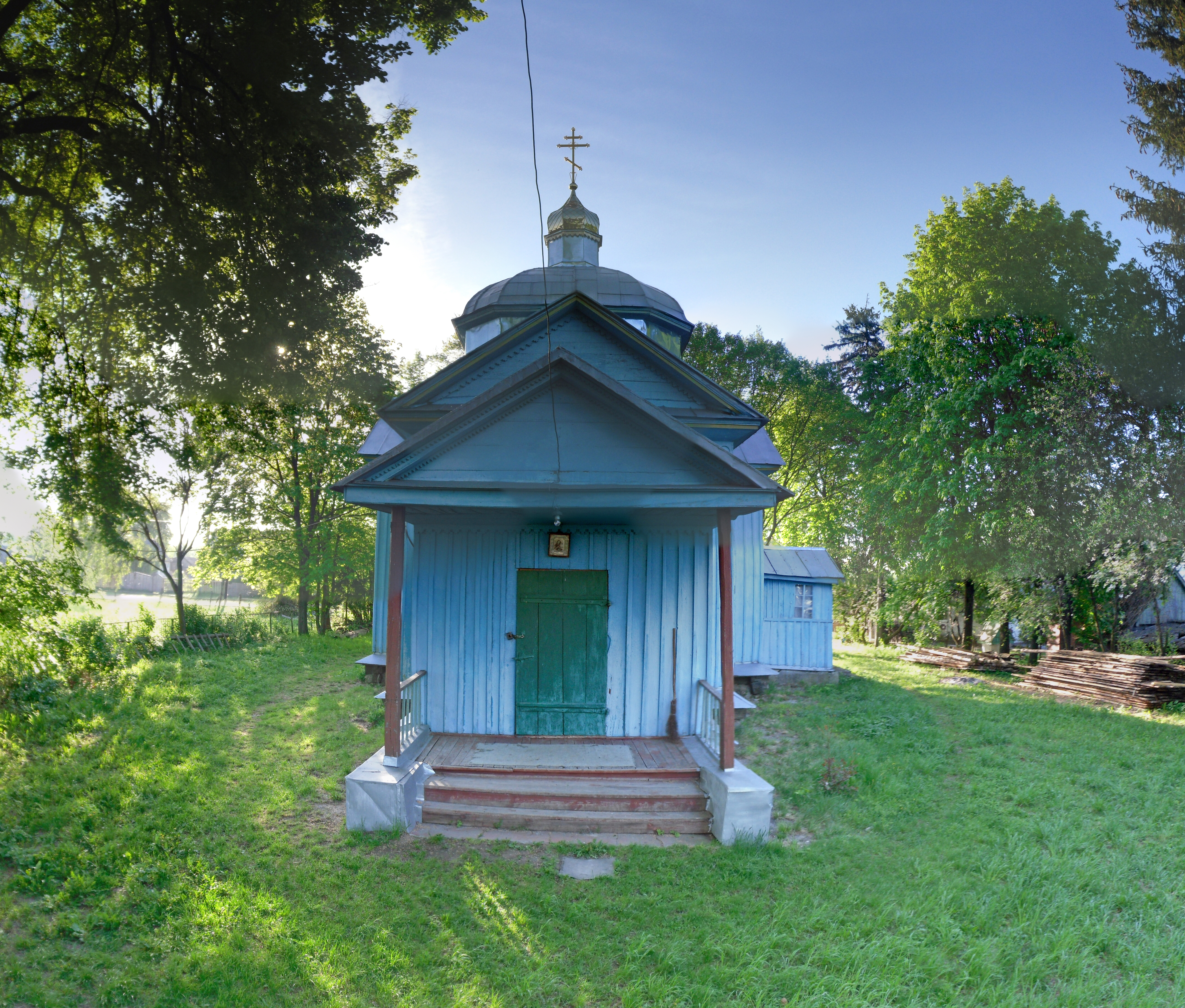 Троїцька церква, с. Монастирок, вул. Центральна